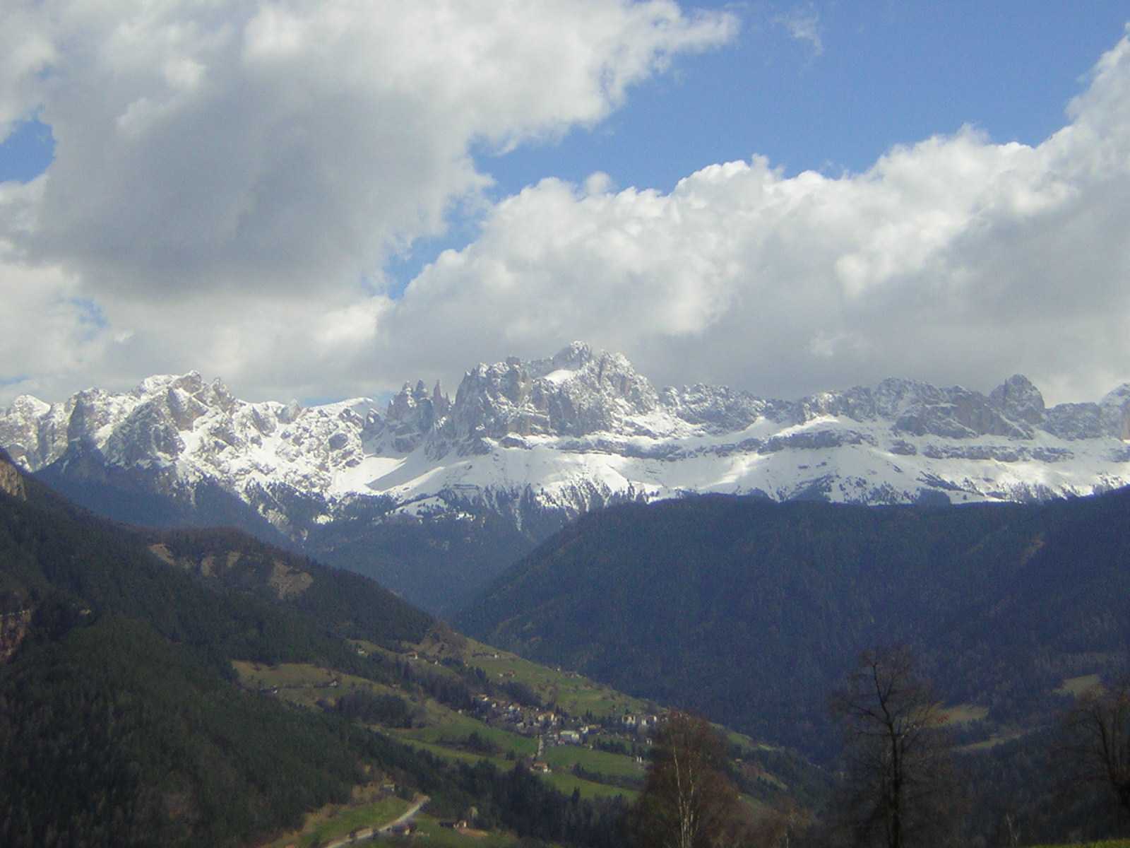 Blick von Steinegg auf den Rosengarten